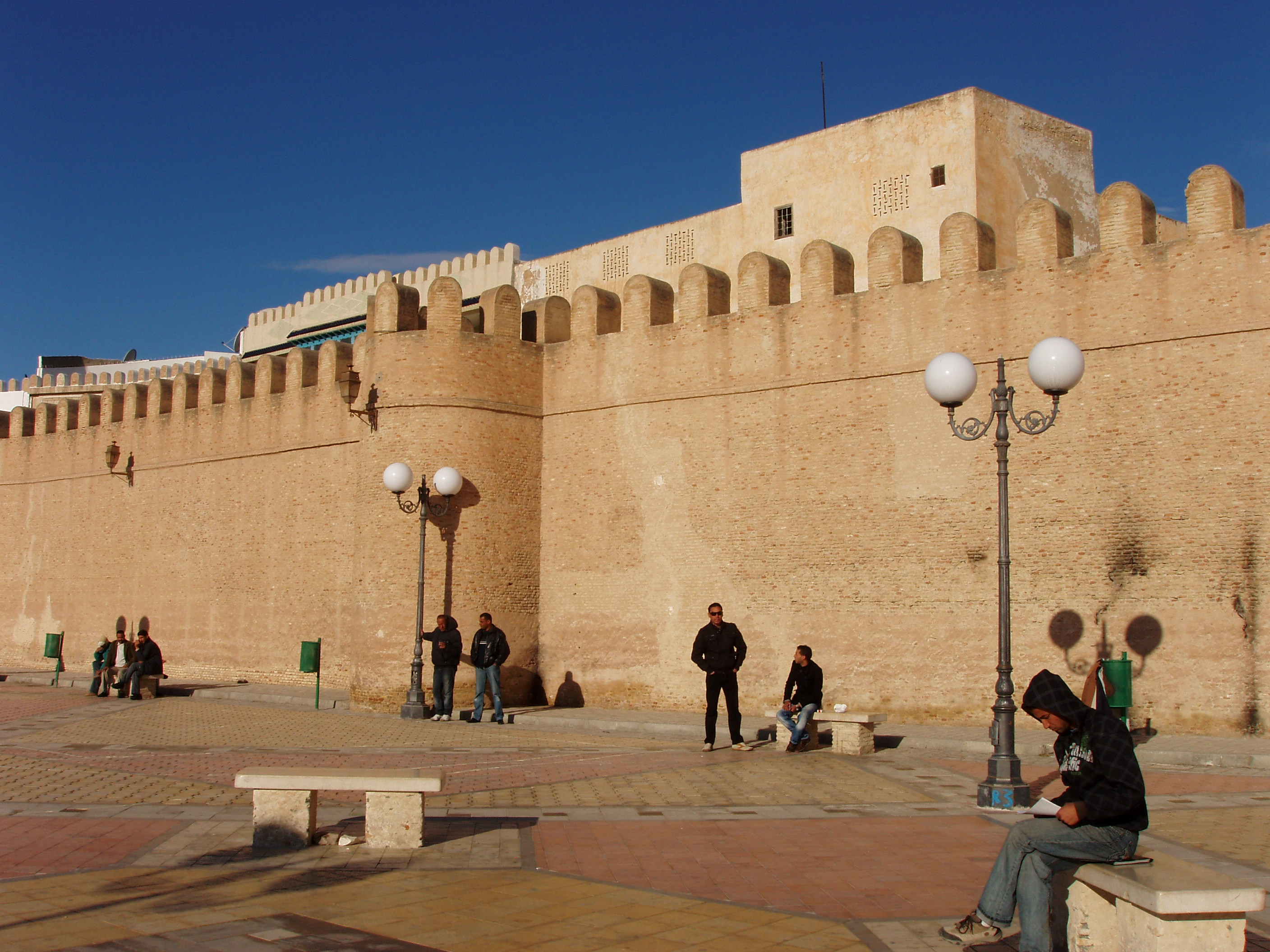 Kairouan medina walls